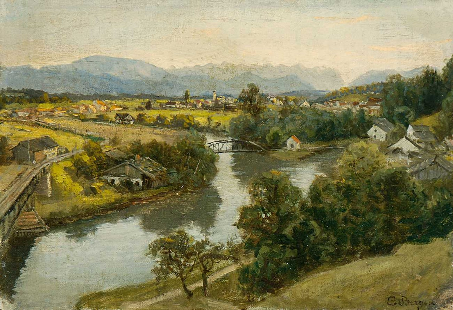 Blick auf Wolfratshausen, Öl auf Leinwand, 15,5 x 21,5 cm, signiert "C. Bergen"